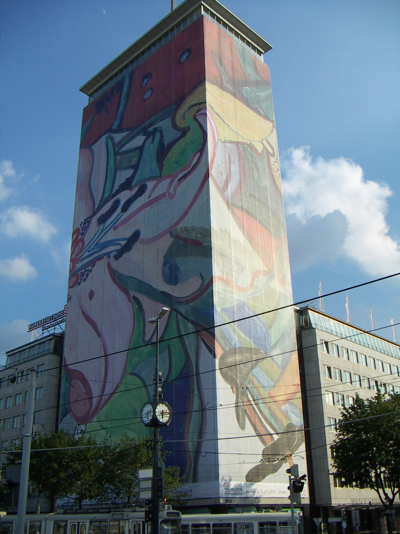 Fassade Franz-Josefs-Kai und Schottenring, der Turm der Kunst in Blüte - Schmalix